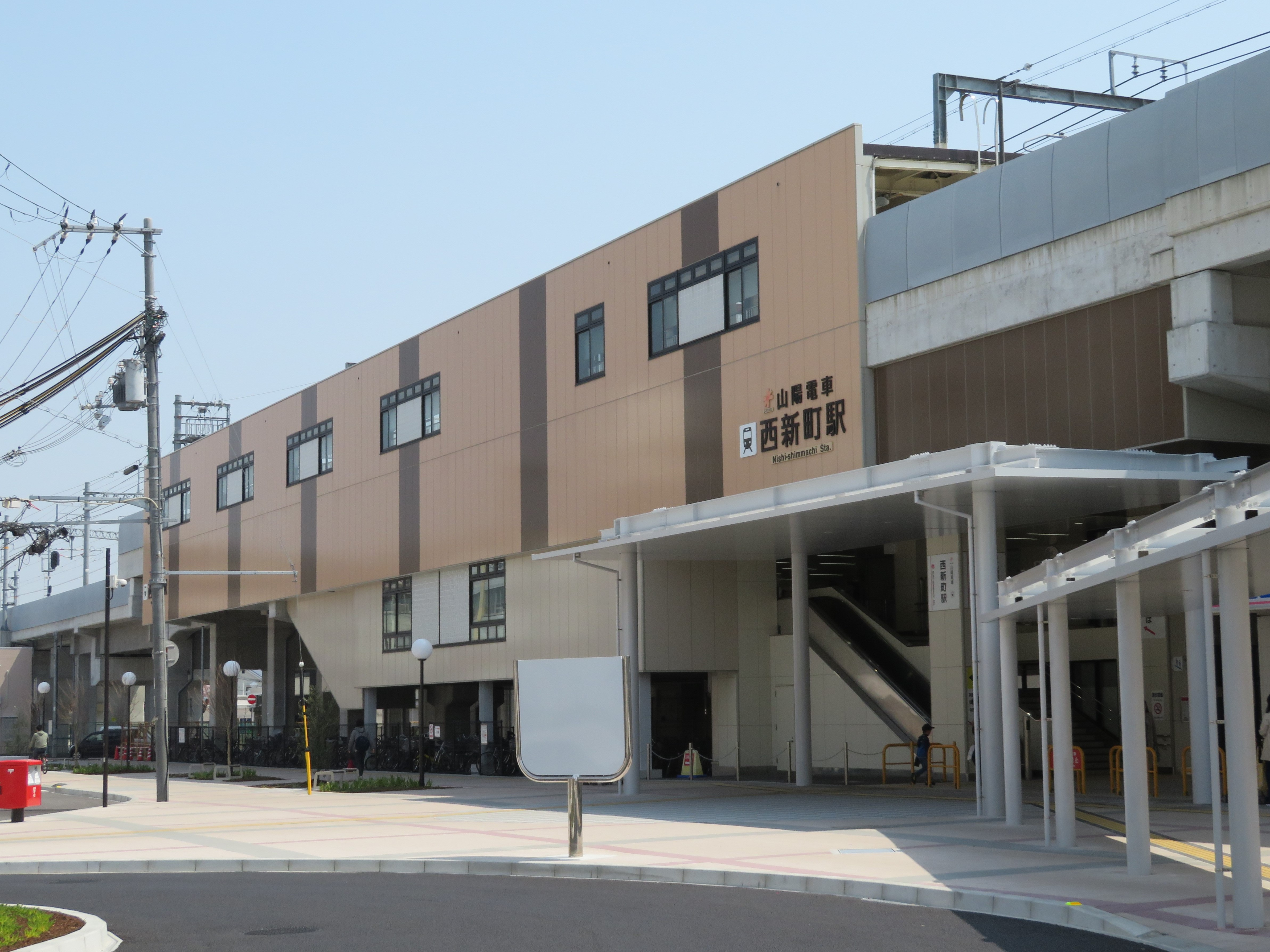 山陽電鉄西新町駅 Canon PowerShot SX730 HS